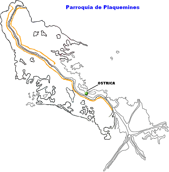 Ostrica, Louisiana